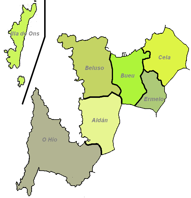 Bueu ata finais do século XIX